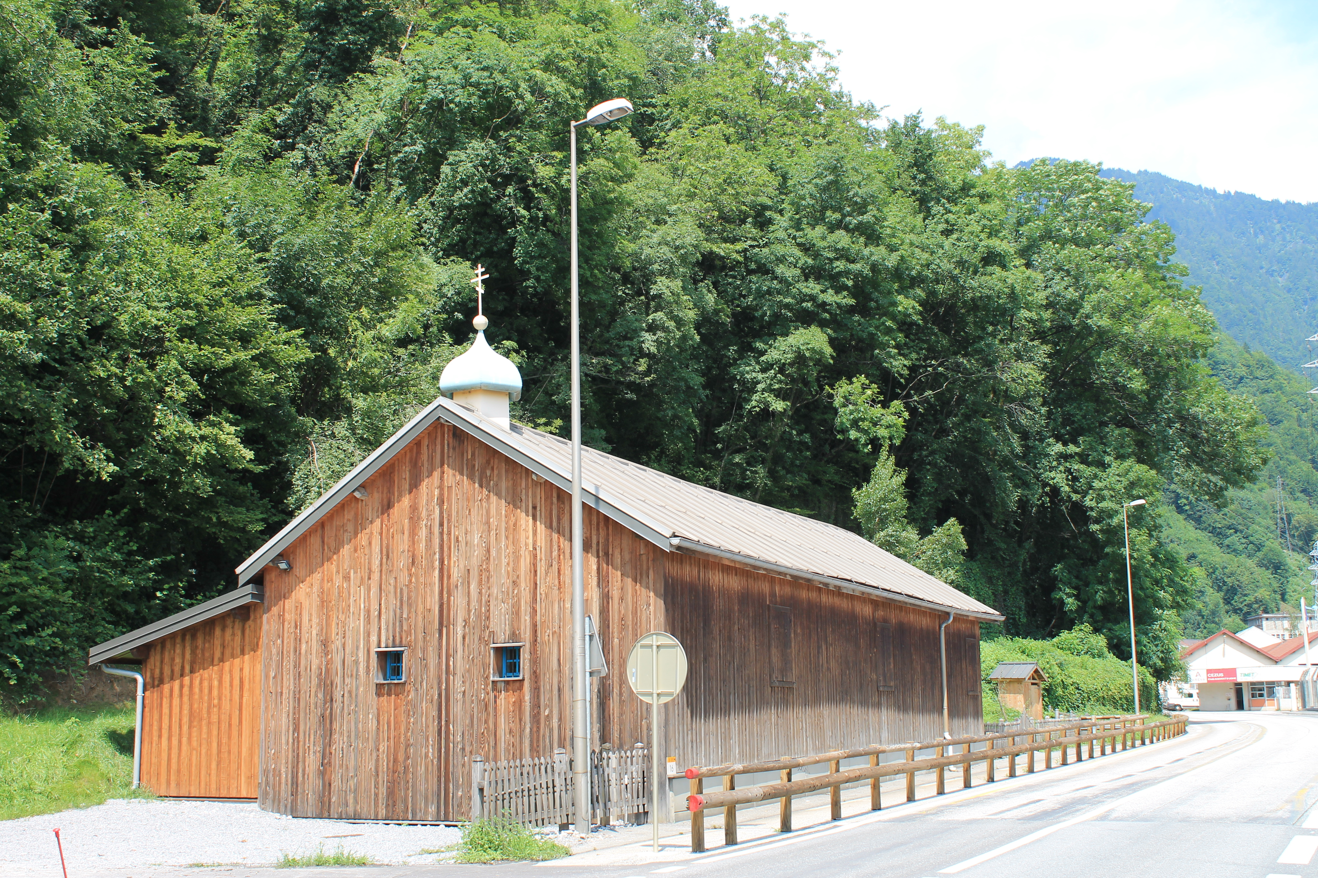 Église orthodoxe Saint-Nicolas d'Ugine - Vue en arrivant d'Ugine